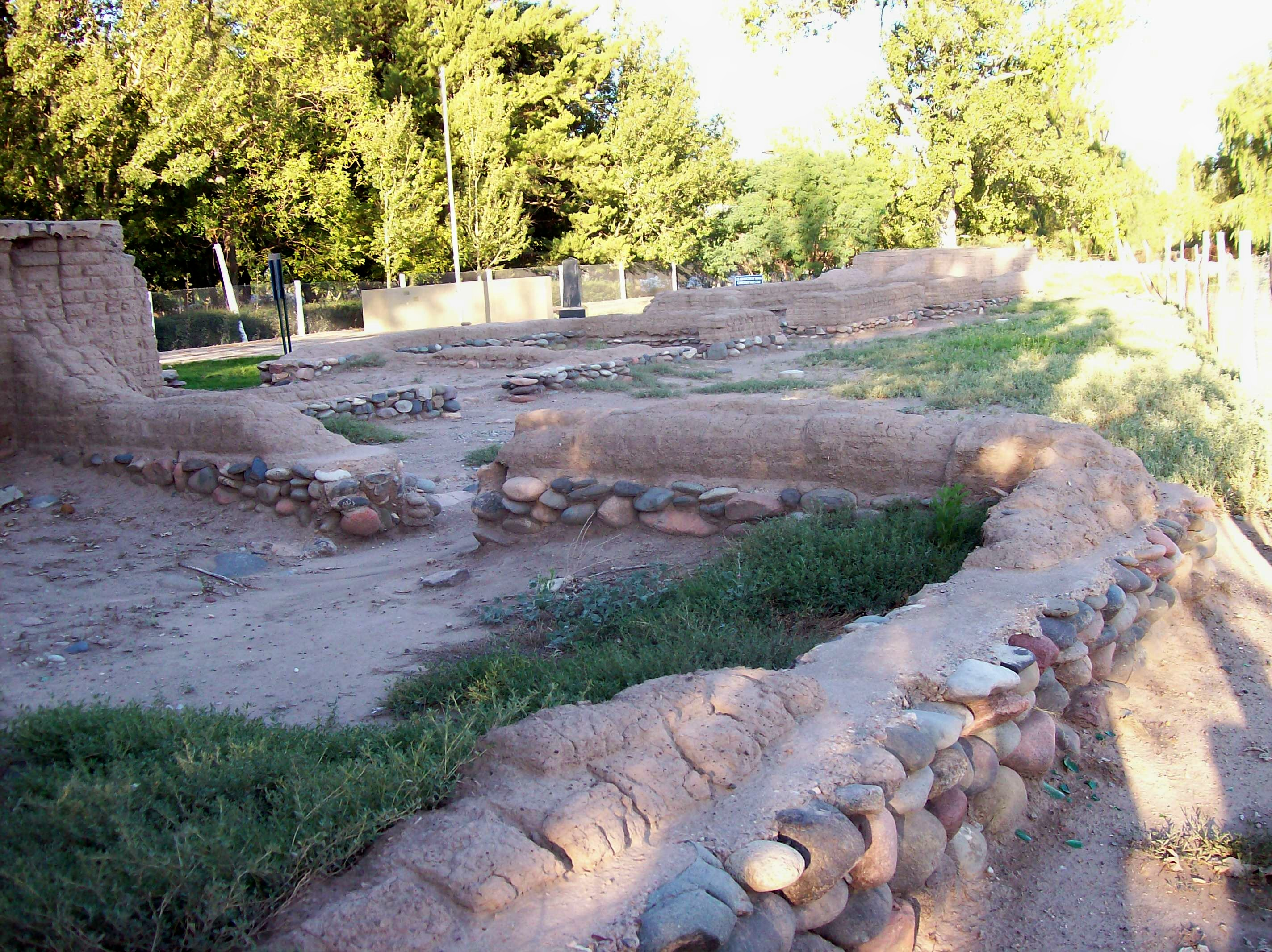 Vestigios del Fuerte en el actual distrito de Villa 25 de Mayo, que fuera cabecera del depto de San Rafael en la provincia de Mendoza, Argentina.